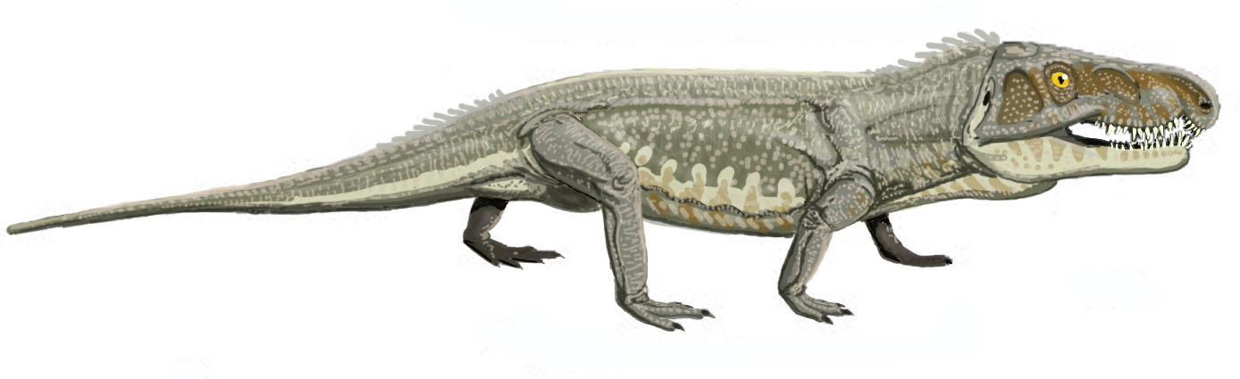 Garjainia